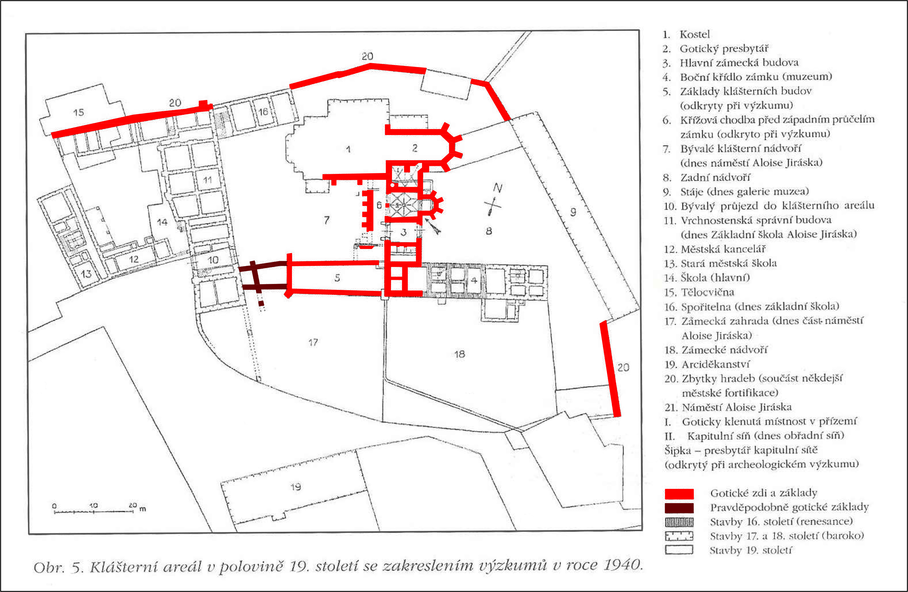 Augustiniánský klášter v Lanškrouně, situace